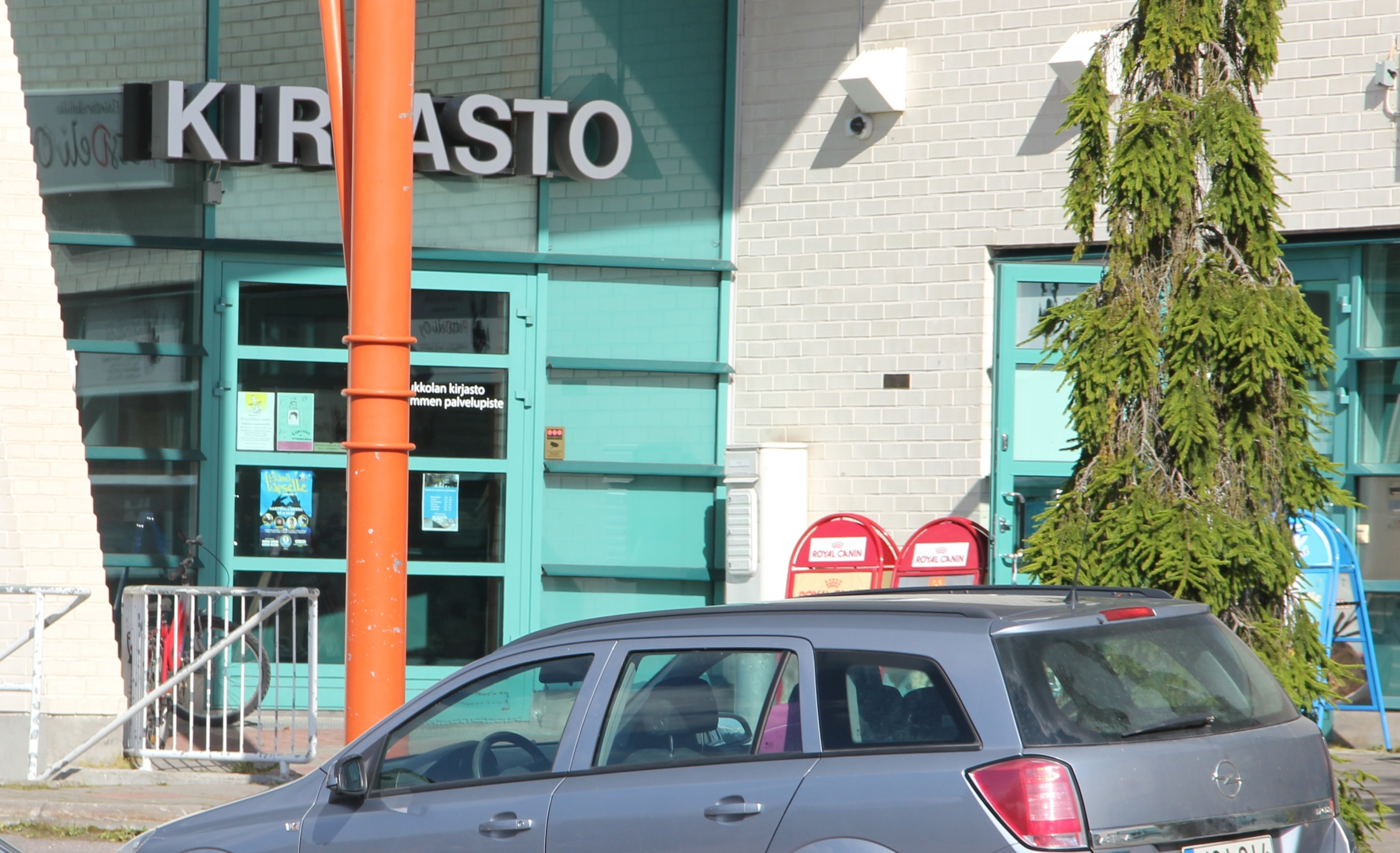 Saukkolan kirjasto, Nummi, Lohja